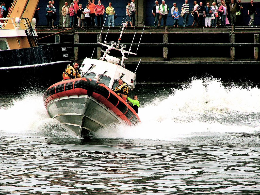 Foto gemaakt in de 1e binnenhaven van Scheveningen tijdens een demonstratie van de KNRM Scheveningen op vlaggetjesdag